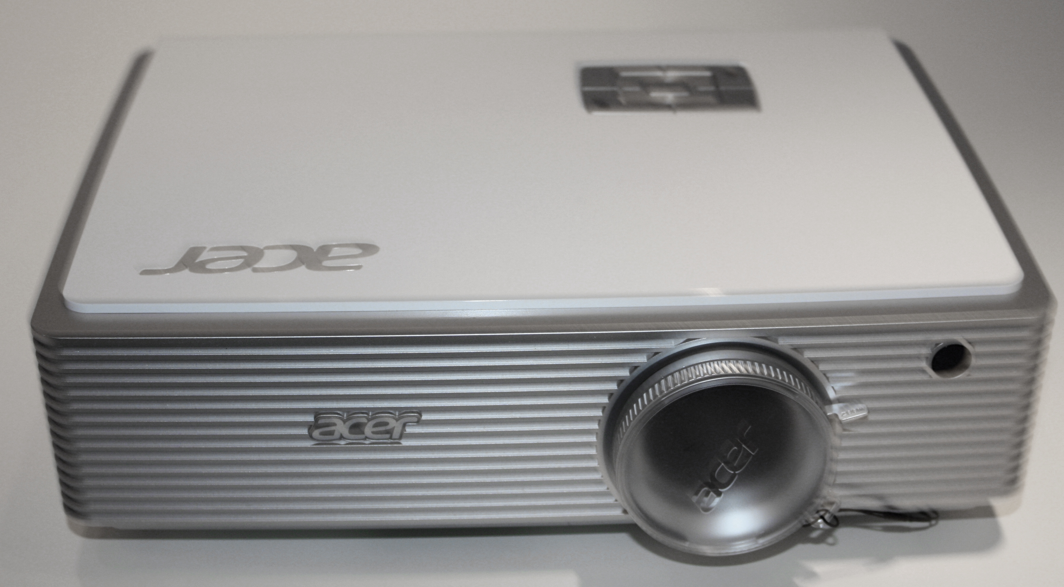 Internationale Funkausstellung 2012 , Acer